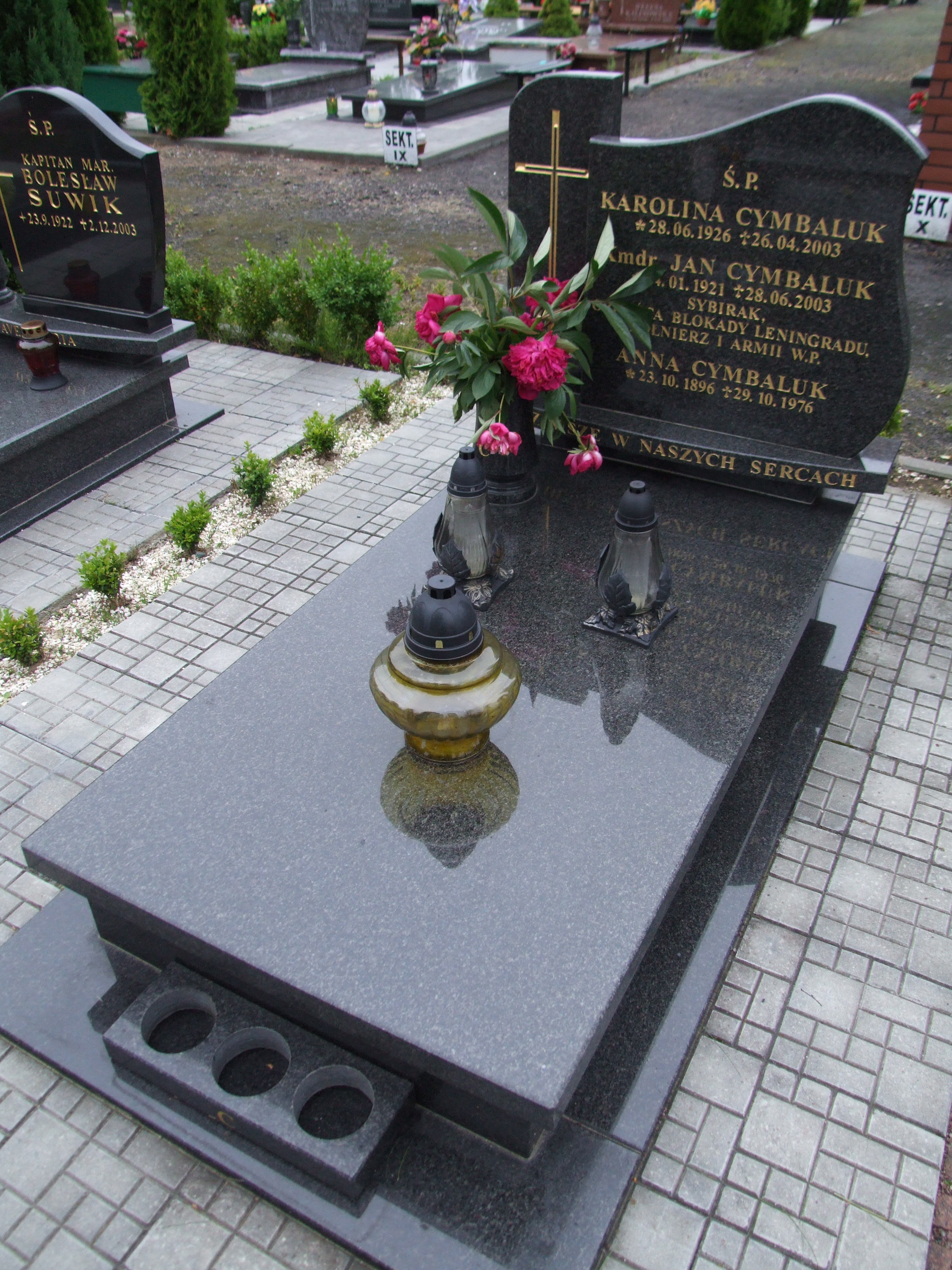 Gdynia-Oksywie Cmentarz Marynarki Wojennej